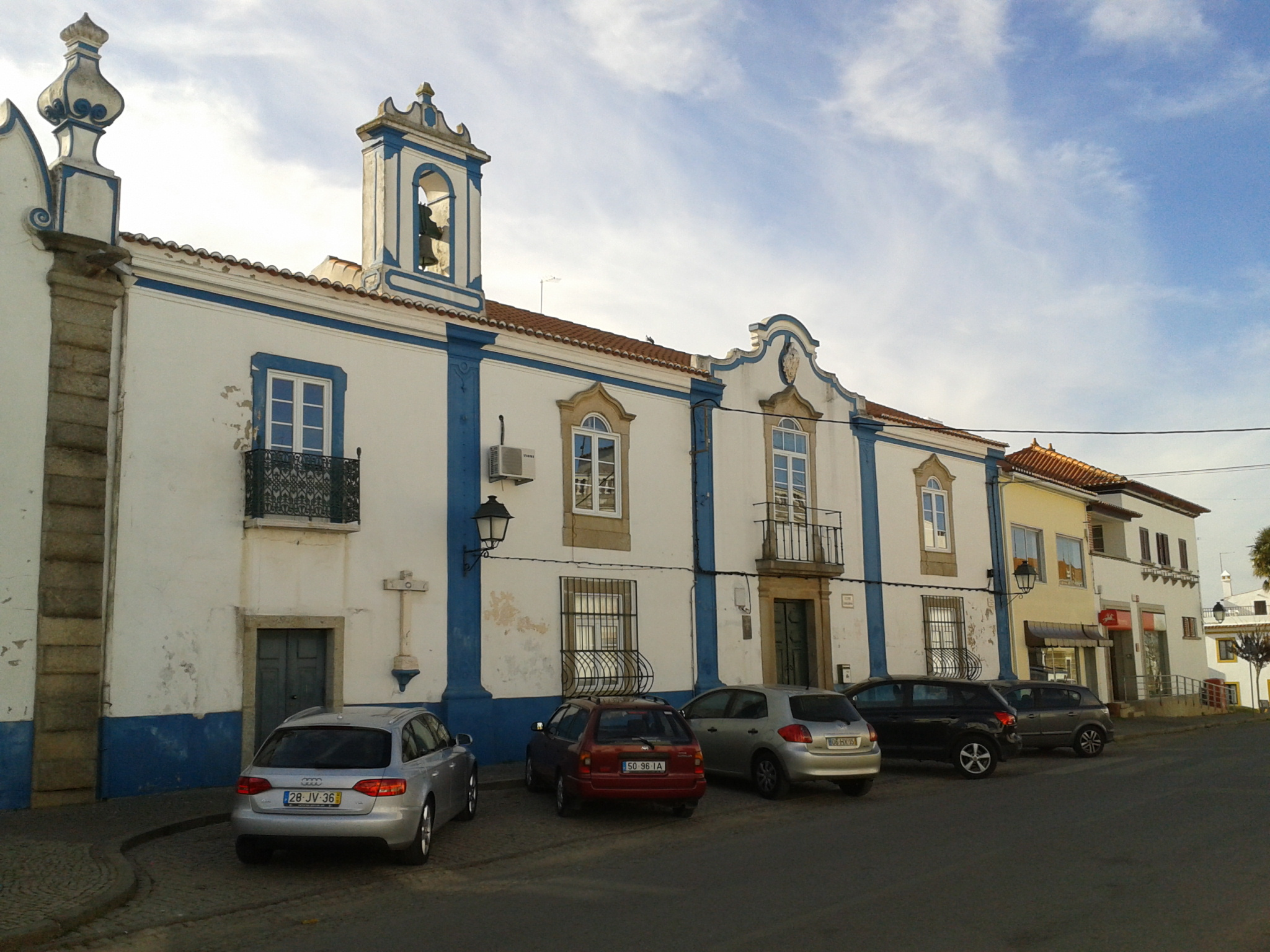 Casa típica de Fronteira.